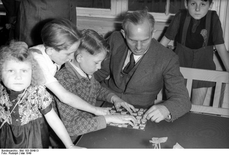 Kindergarten im Bremswerk in Berlin Am 30.4.49 wurde im Bremswerk am Bahnhof Ostkreuz ein Kindergarten eröffnet. Er hat heute Platz für 30 Kinder von Arbeitern und Angestellten des Bremswerkes. Eine Erweiterung auf 100 Plätze ist vorgesehen. UBz: Bürgermeister Gohr hat ein paar kleine Freunde gefunden, die sich freuen, einen guten Spielpartner, wenn auch nur für kurze Zeit, gefunden zu haben. Aufn.: Illus/Rudolph S 84 913 3181-49 5.5.49